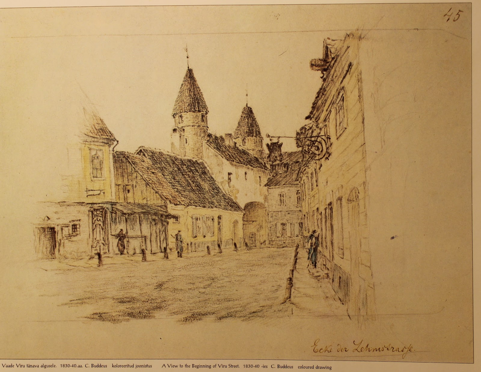 vaade viru tänavale